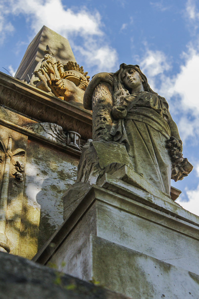 Mausoleo del General José María de la Cruz This is a photo of a national monument in Chile: 656